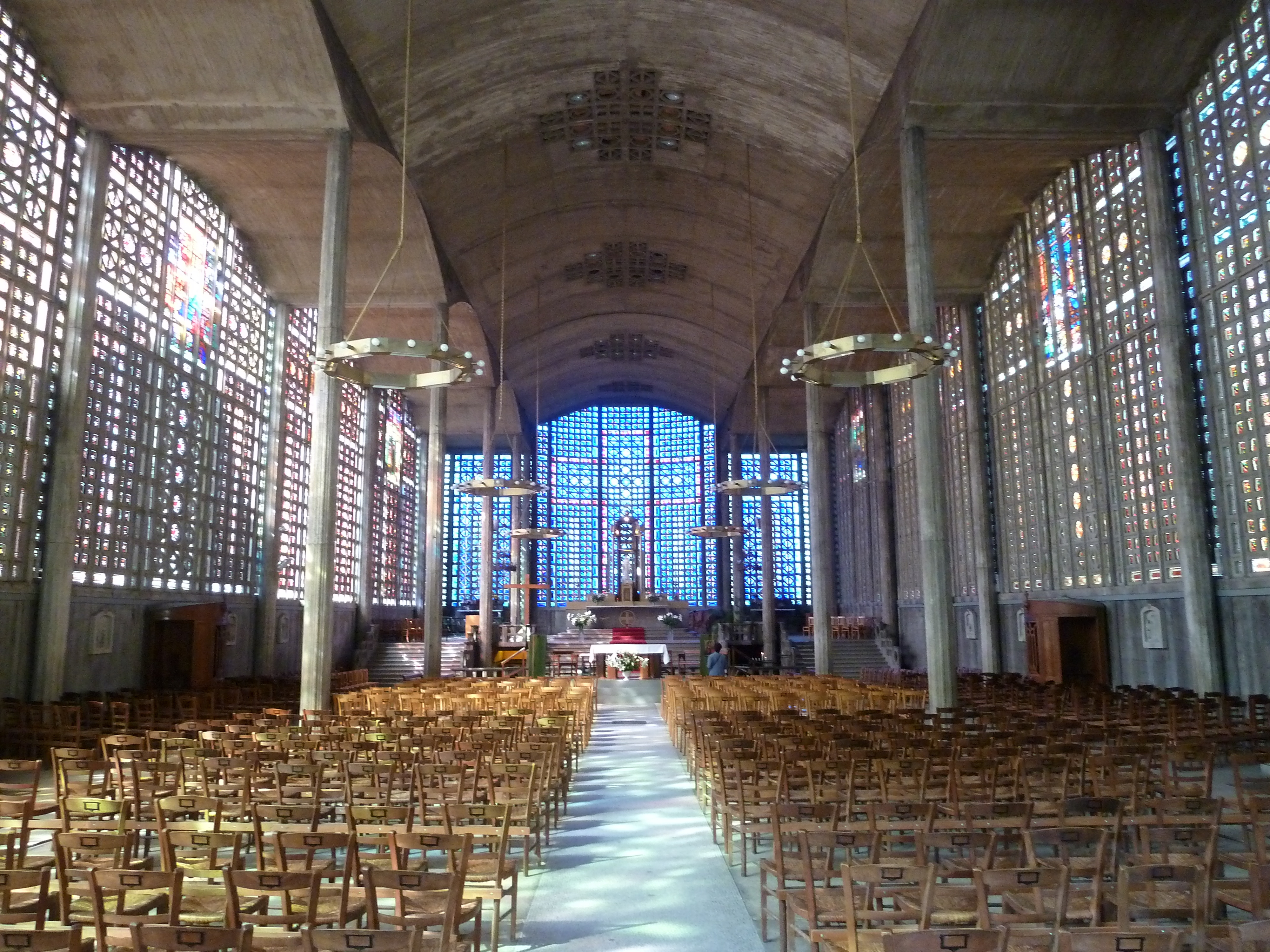 Église Notre-Dame du Raincy - Le Raincy - Seine-Saint-Denis - France - Mérimée PA00079948 .